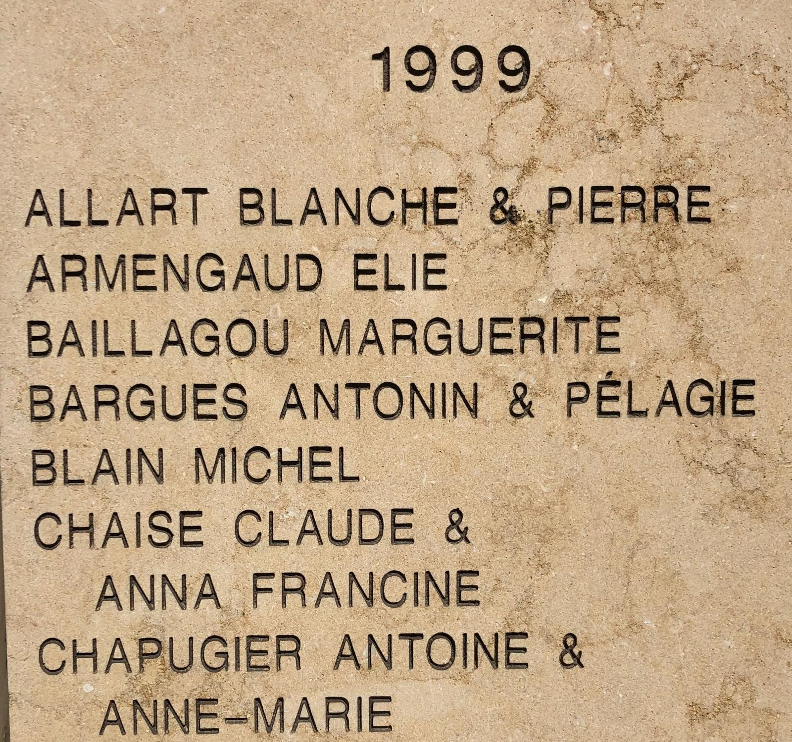 שמו של מישל בליין על קיר השמות בגן חסידי אומות העולם במוזיאון יד ושם